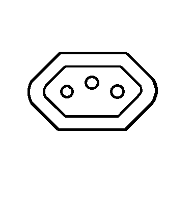 Tomada padrão NBR 14.136 esquemática